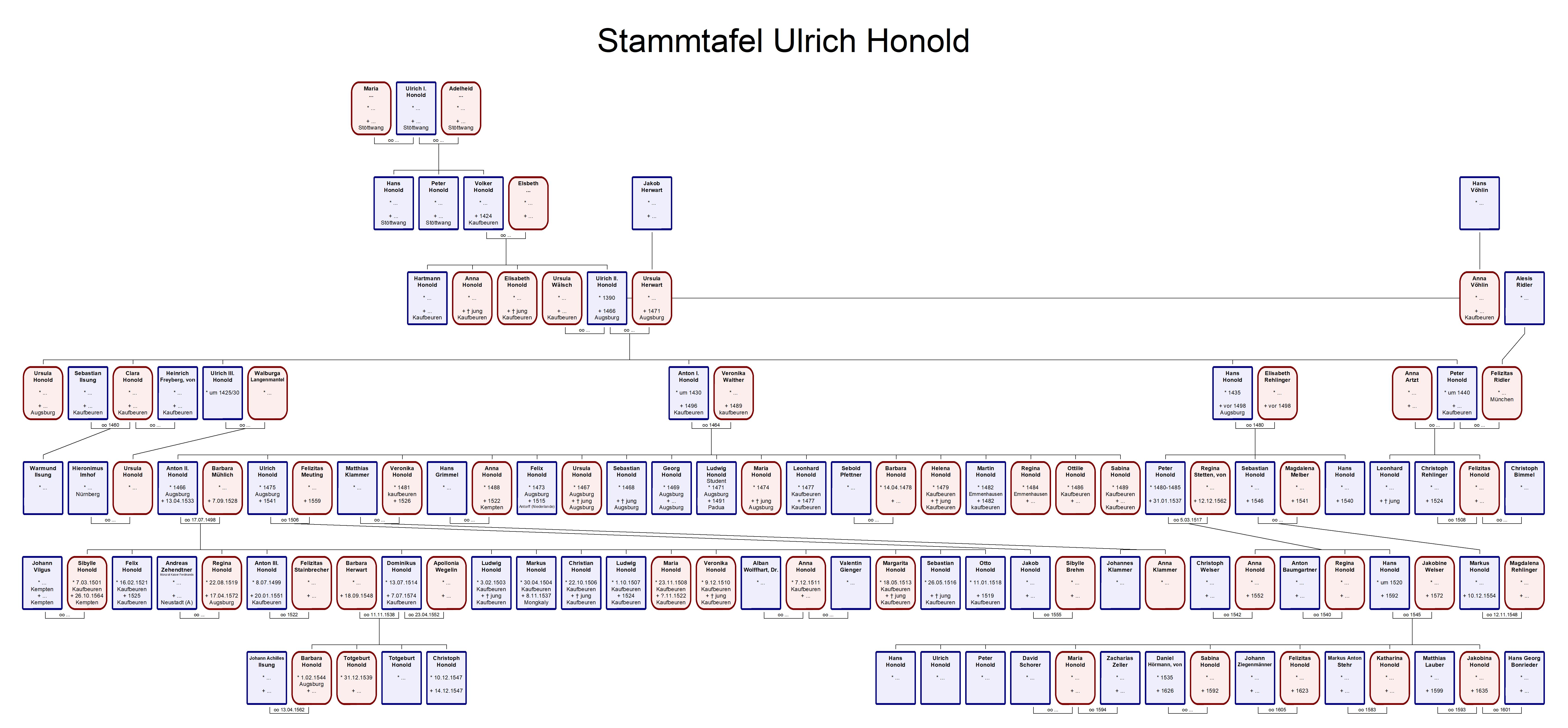 Versuch einer Stammtafel der Familie Honold vom Luchs, bginnend mit Ulrich Honold von Stöttwang/Kaufbeuren